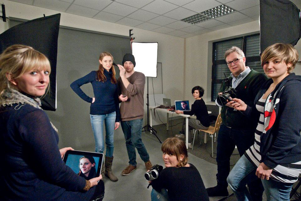 Studiofotografie